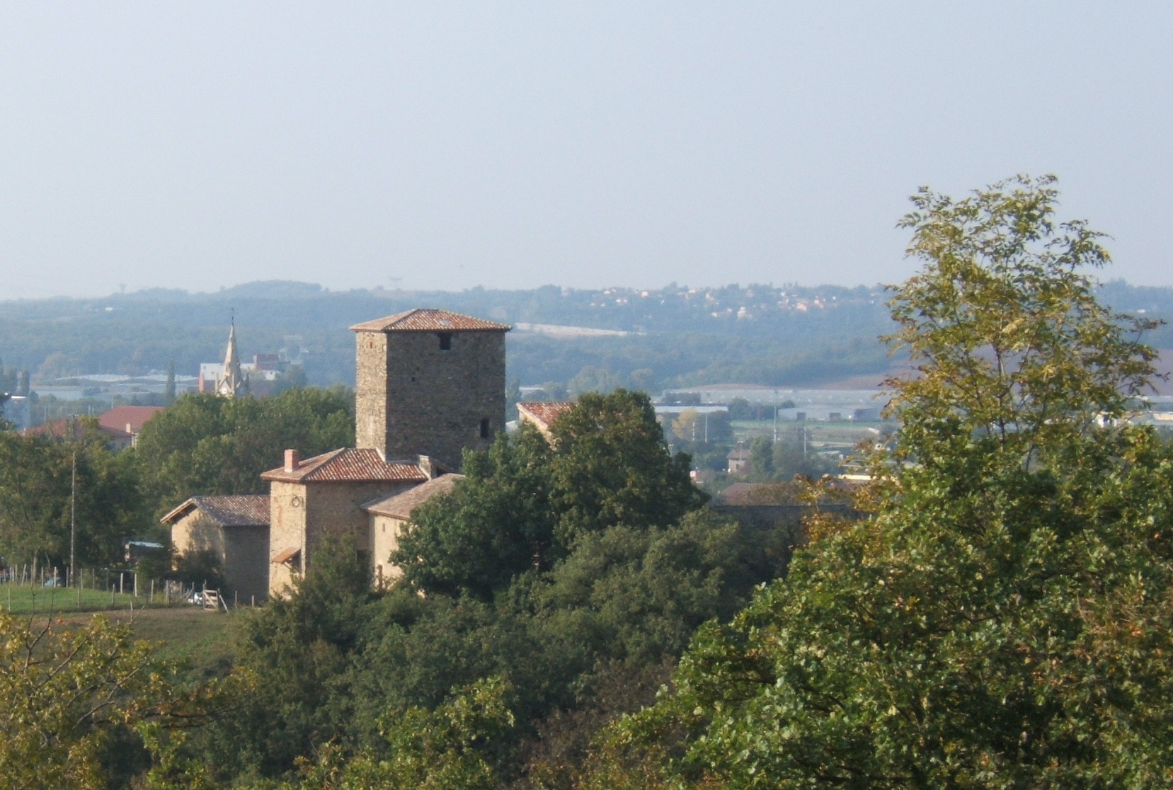 Maison forte des Allinges (France)